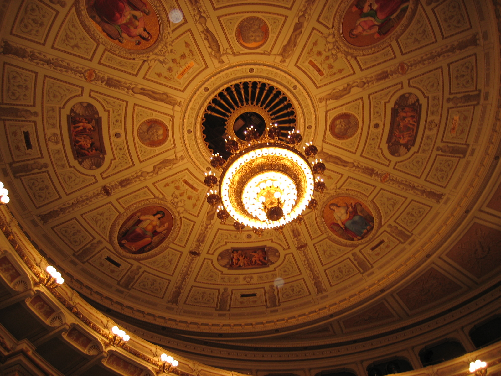 Die Semperoper in Dresden.